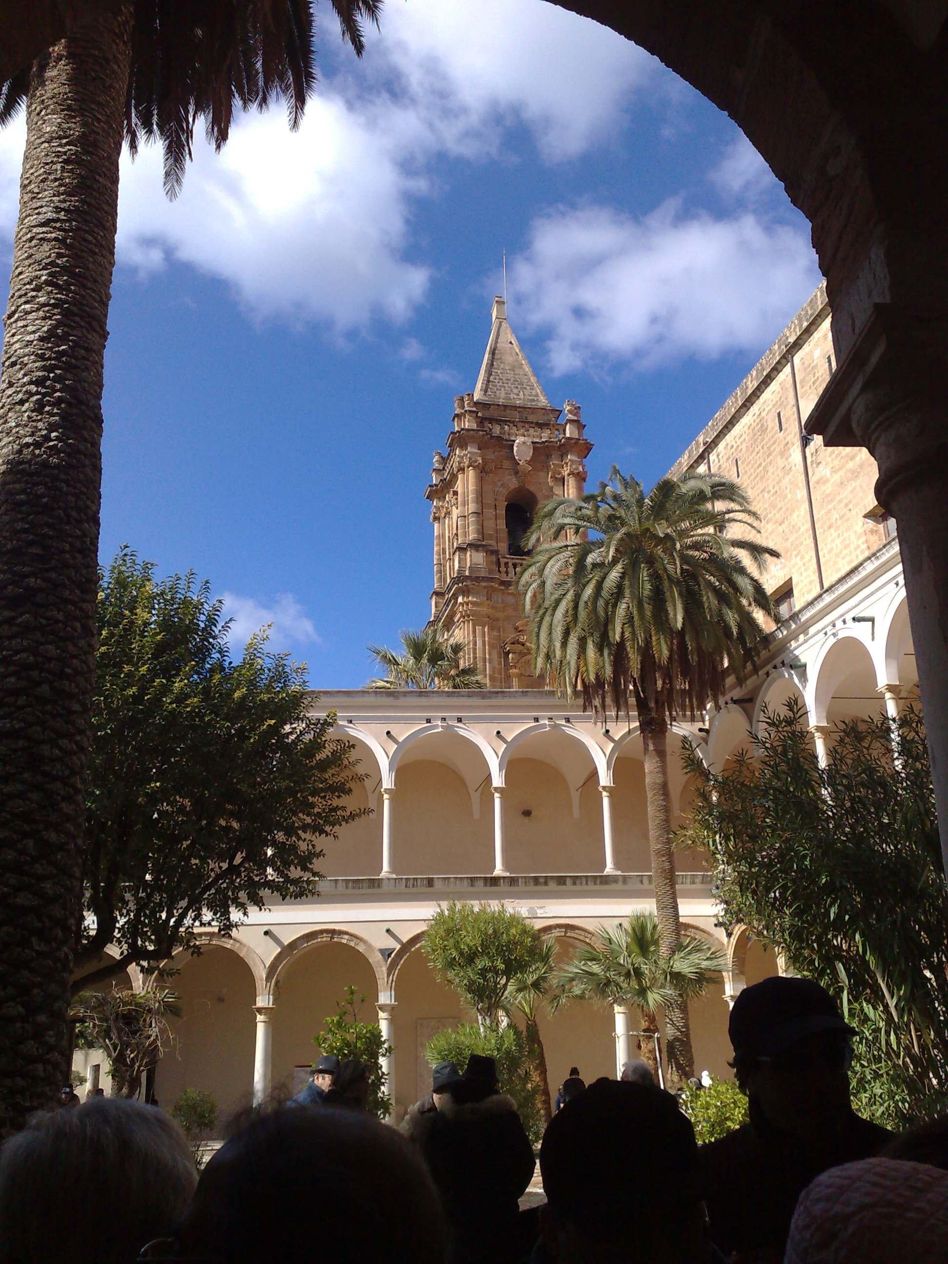 Chiostro Museo Pepoli, Trapani